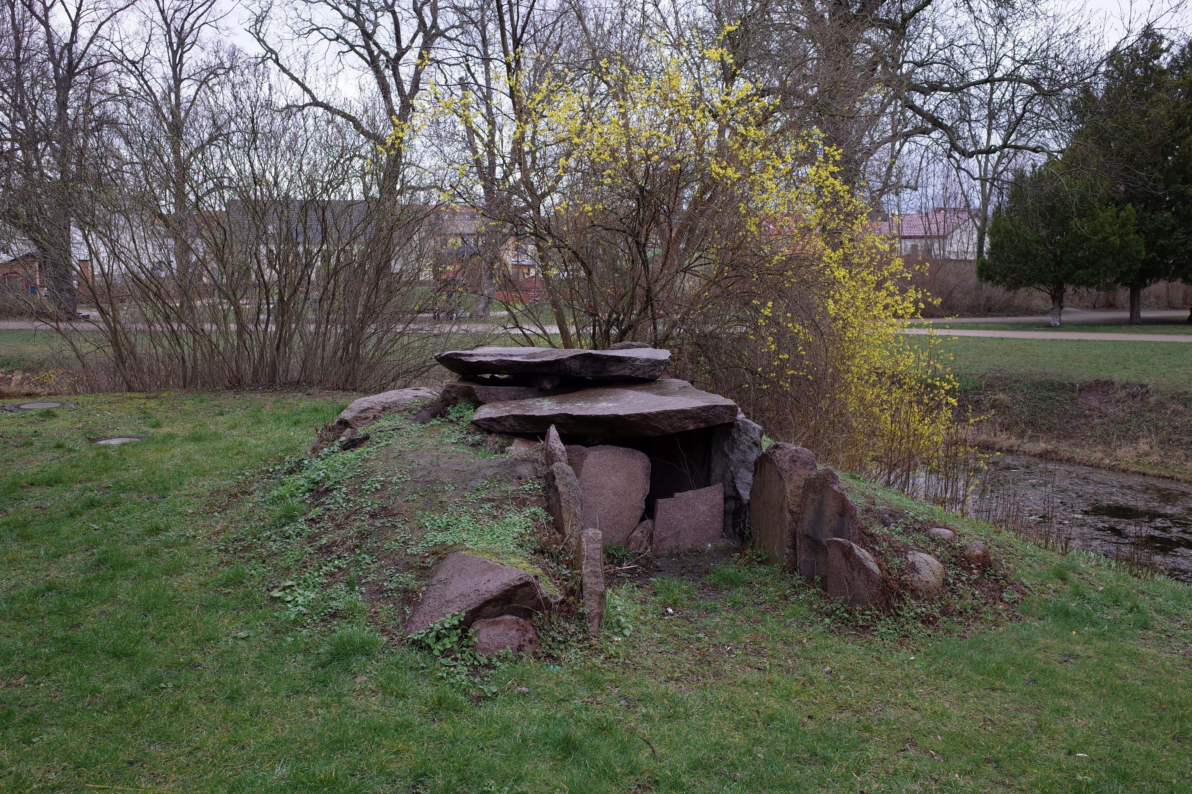 Köthen, Steinkiste Schortewitz, Grabmal im Schlosspark. Wiederaufgebautes Steinkistengrab am Schloss.